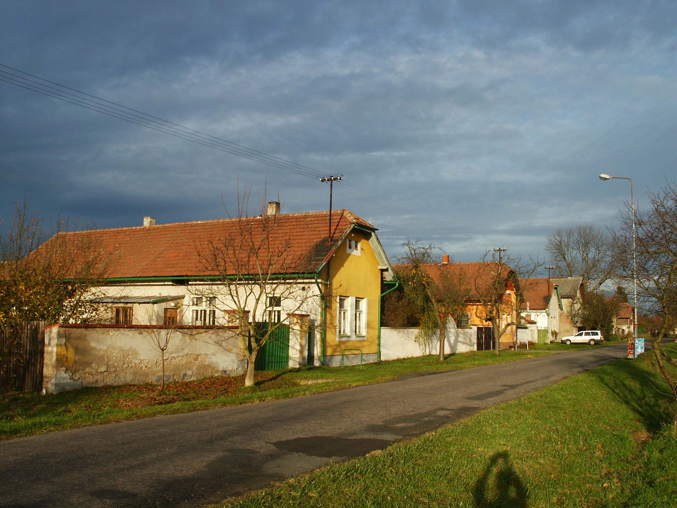 Klipec - typická zástavba